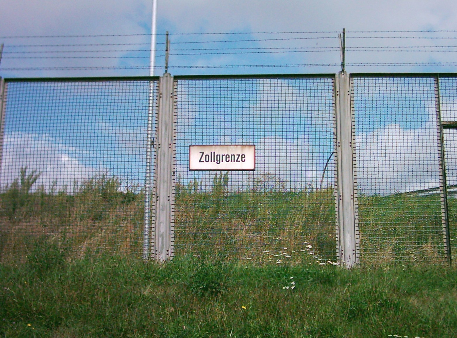 Schild Zollgrenze in Hamburg-Kleiner Grasbrook.